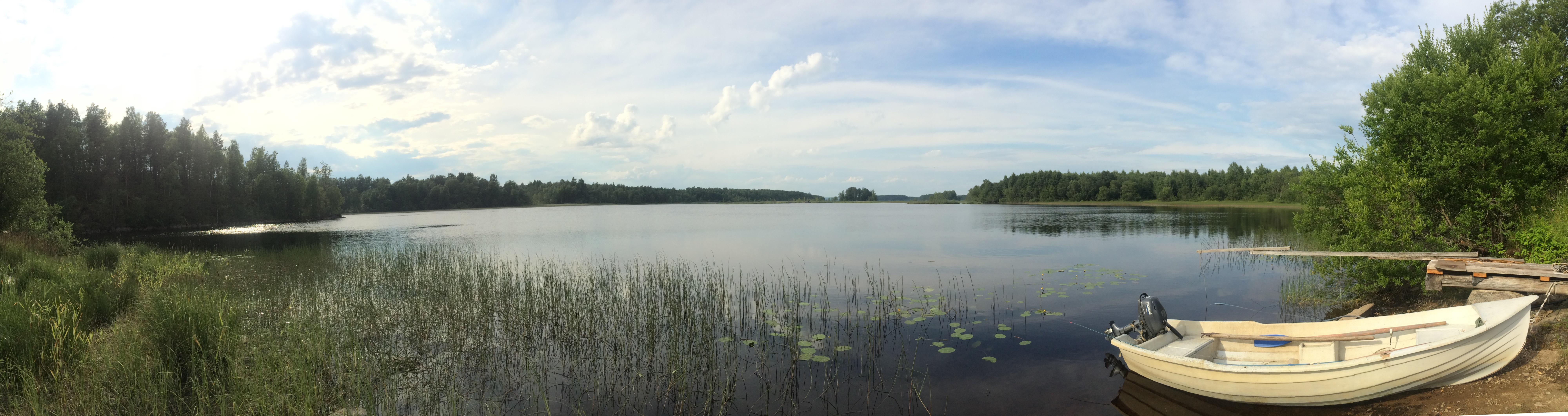 Кримозеро